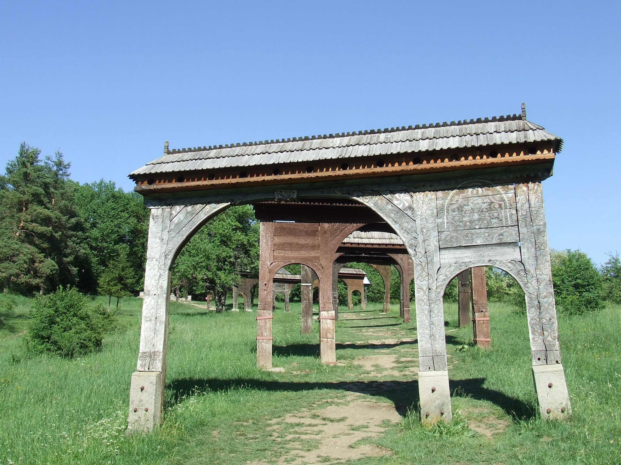 Székelyudvarhely, Szejkefürdő, Orbán Balázs síremléke